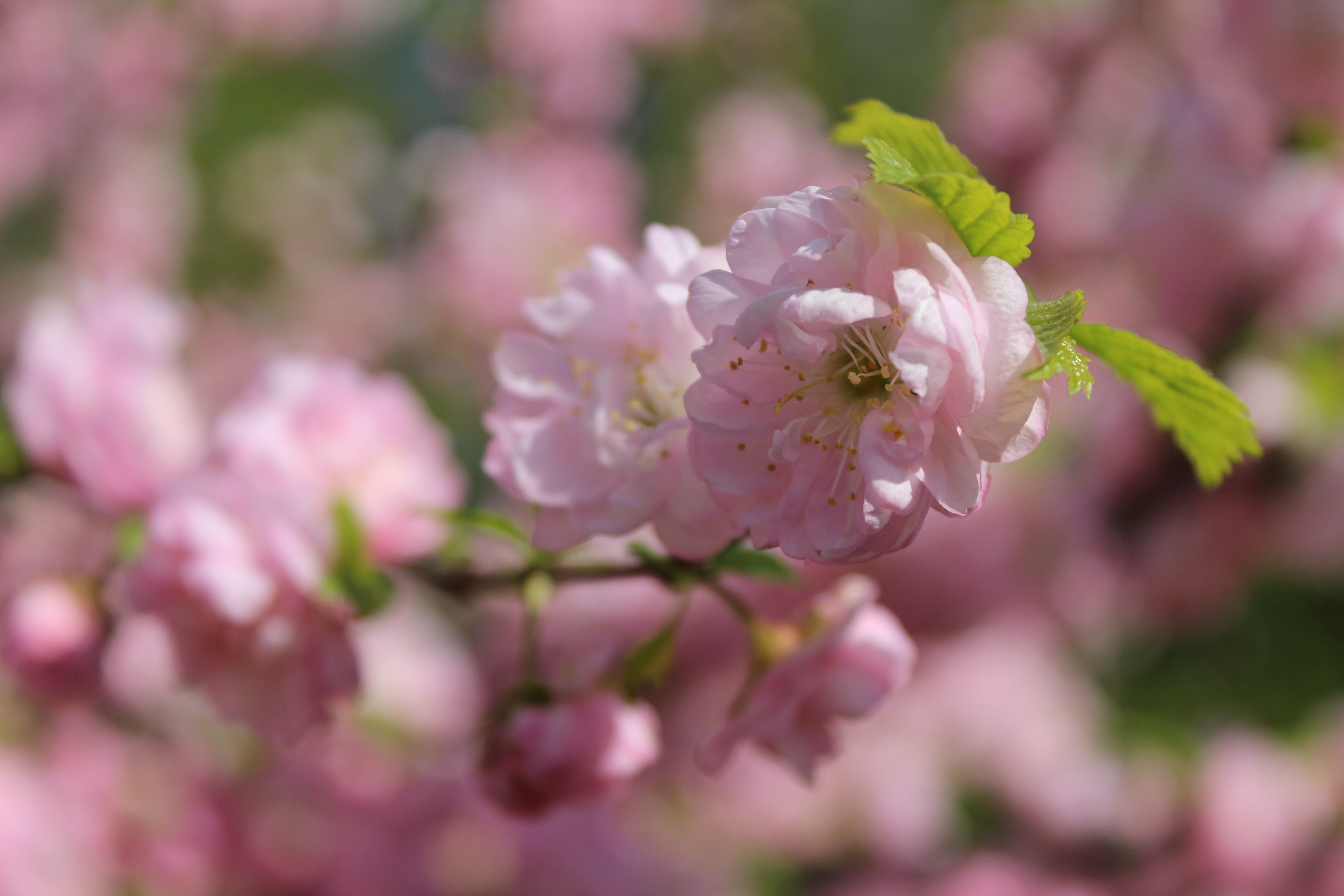 Косинский заповедник, This image is related to the protected area of Russia number 5000004